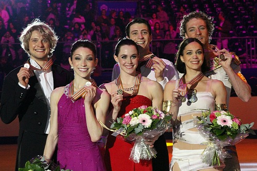 Подиум чемпионата мира по фигурному катанию 2012 в танцах на льду. Мэрил Дэвис / Чарли Уайт (2-е место), Тесса Вертью / Скотт Моир (1-е место), Натали Пешала / Фабьян Бурза (3-е место)